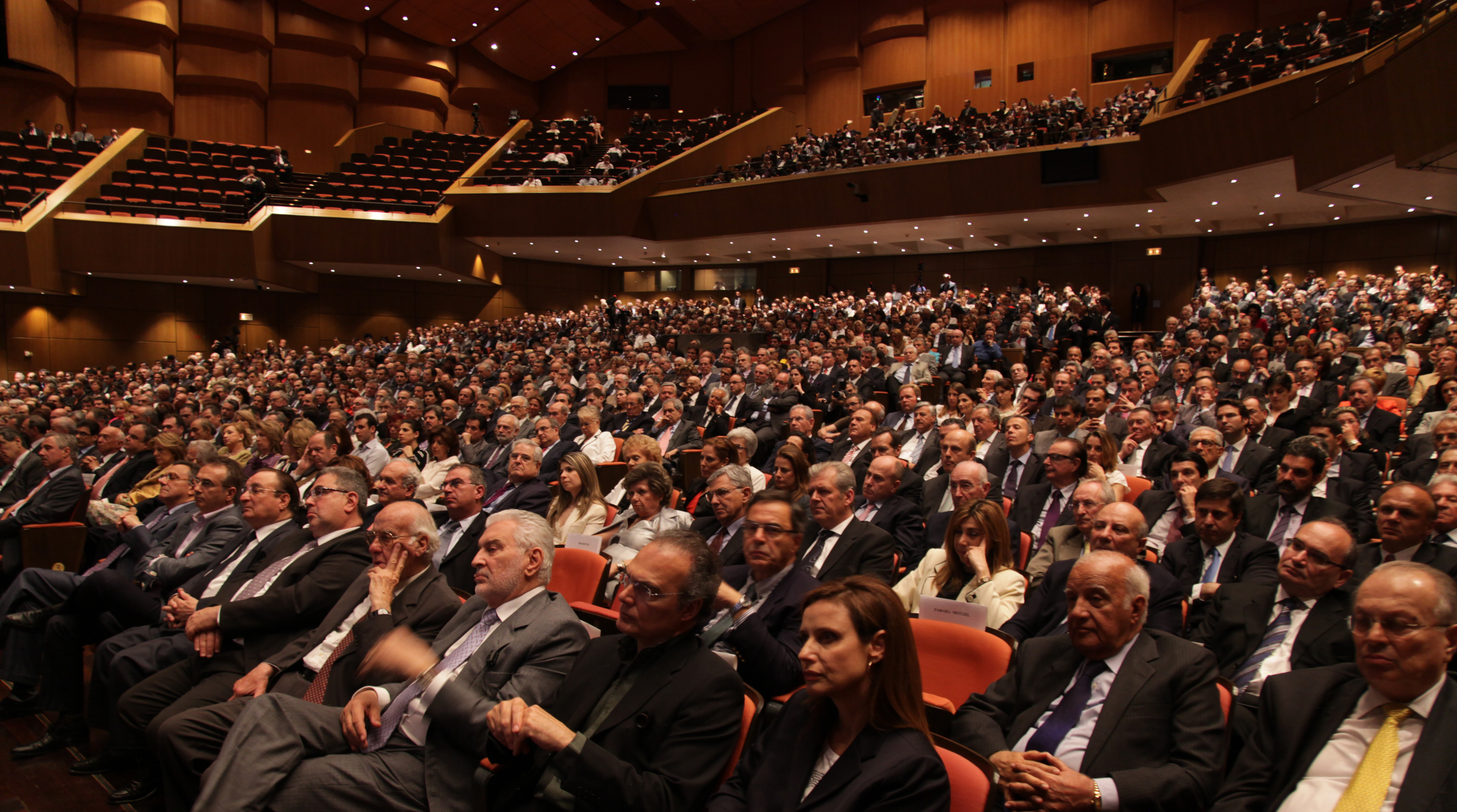 Αίθουσα "Χρήστος Λαμπράκης", Μέγαρο Μουσικής Αθηνών 24 Μαΐου, 2011